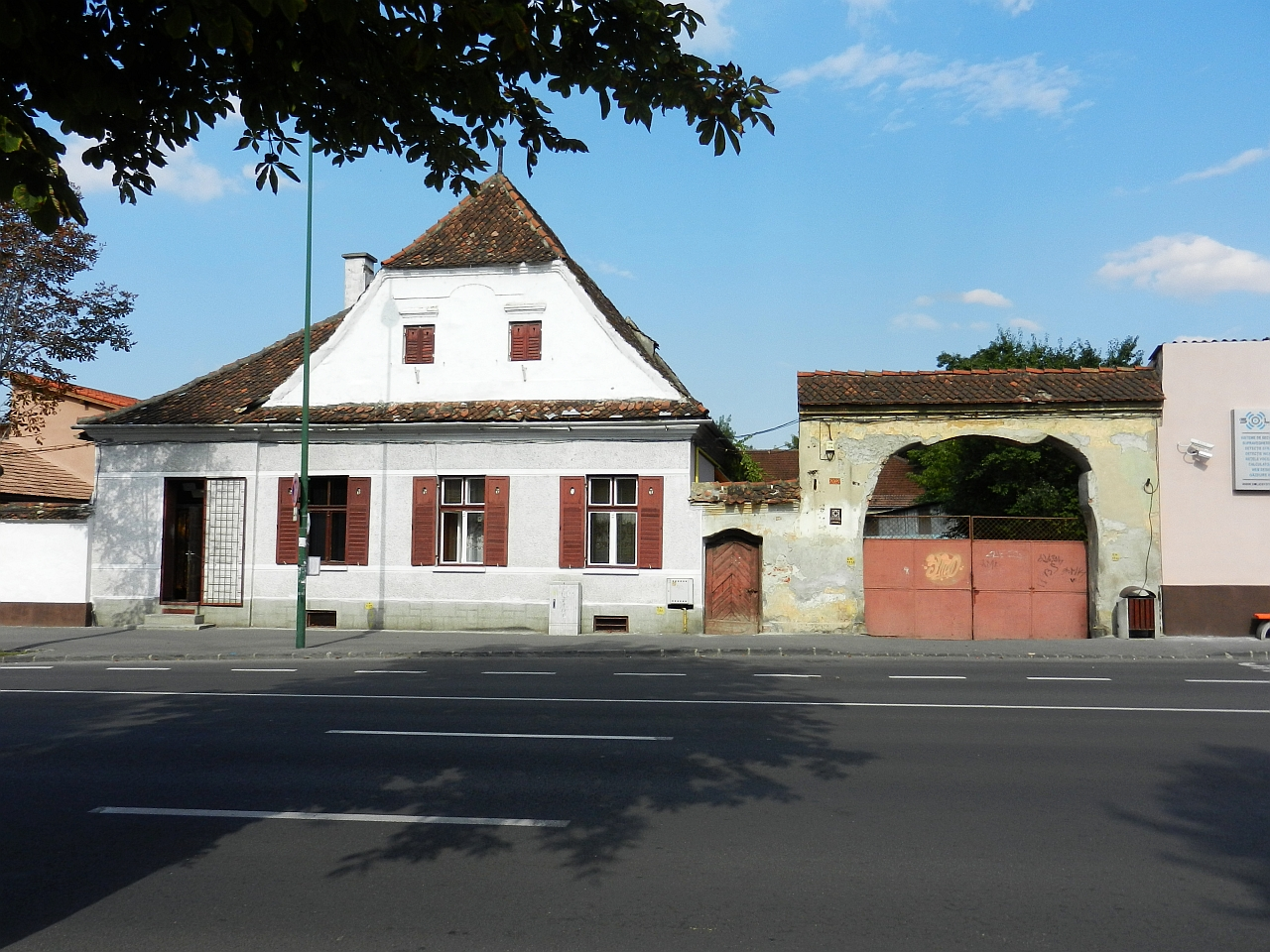 Casa monument istoric (Lunga 202)